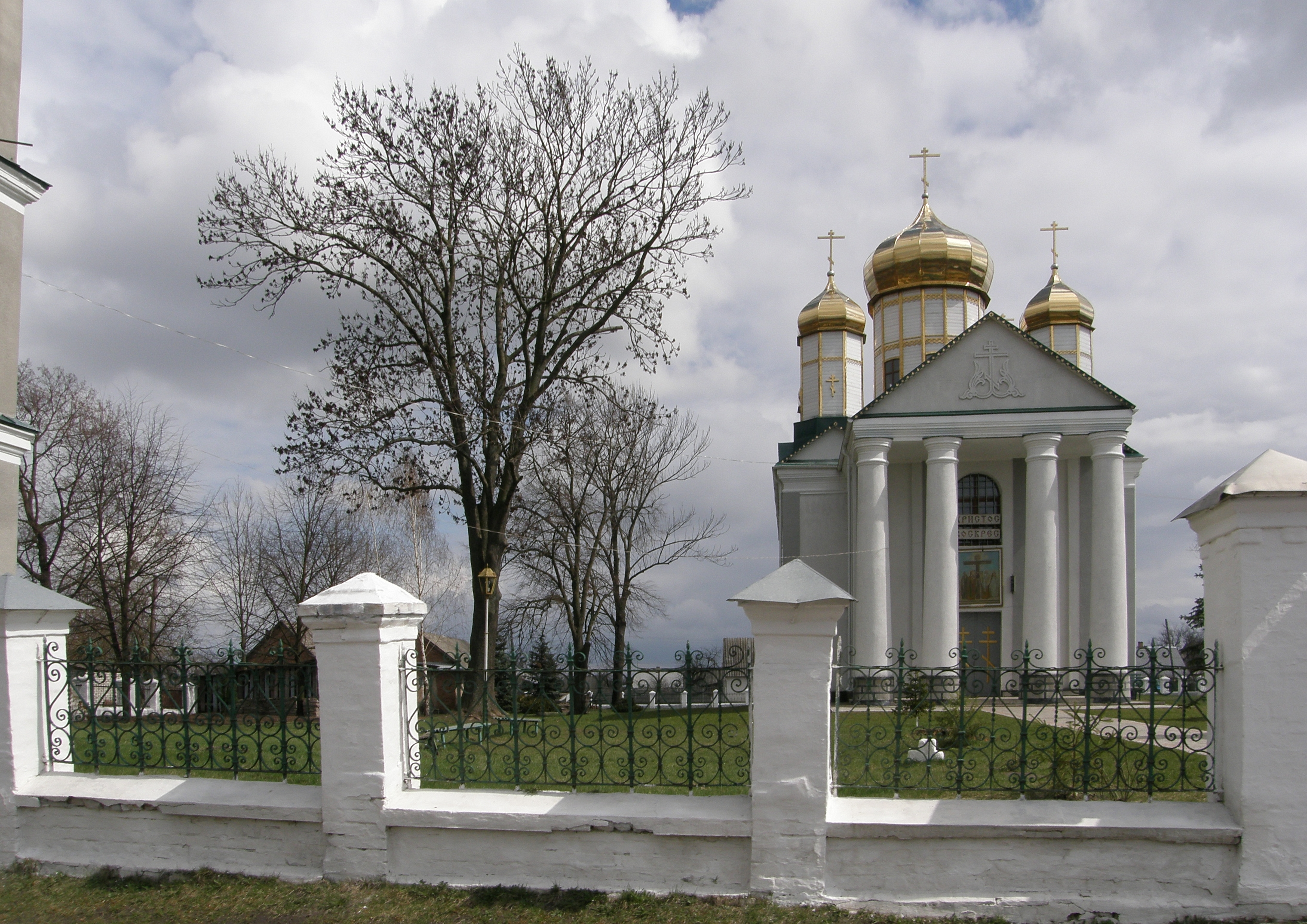 Orthodoxe Kirche in Kolky